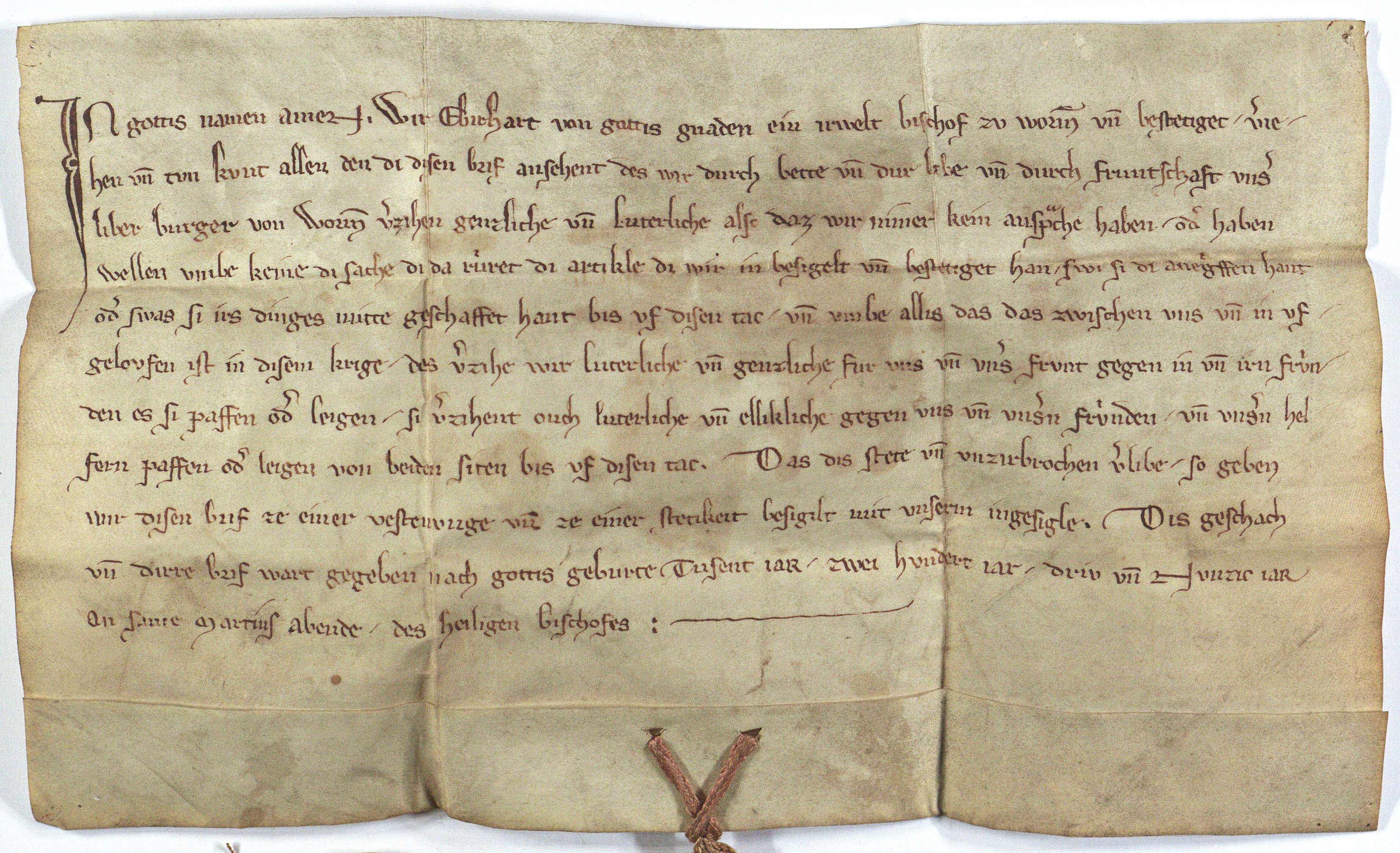 Urkunde des Wormser Bischofs Eberhard II. von Strahlenberg, zugunsten der Stadt Worms, 10.11.1293